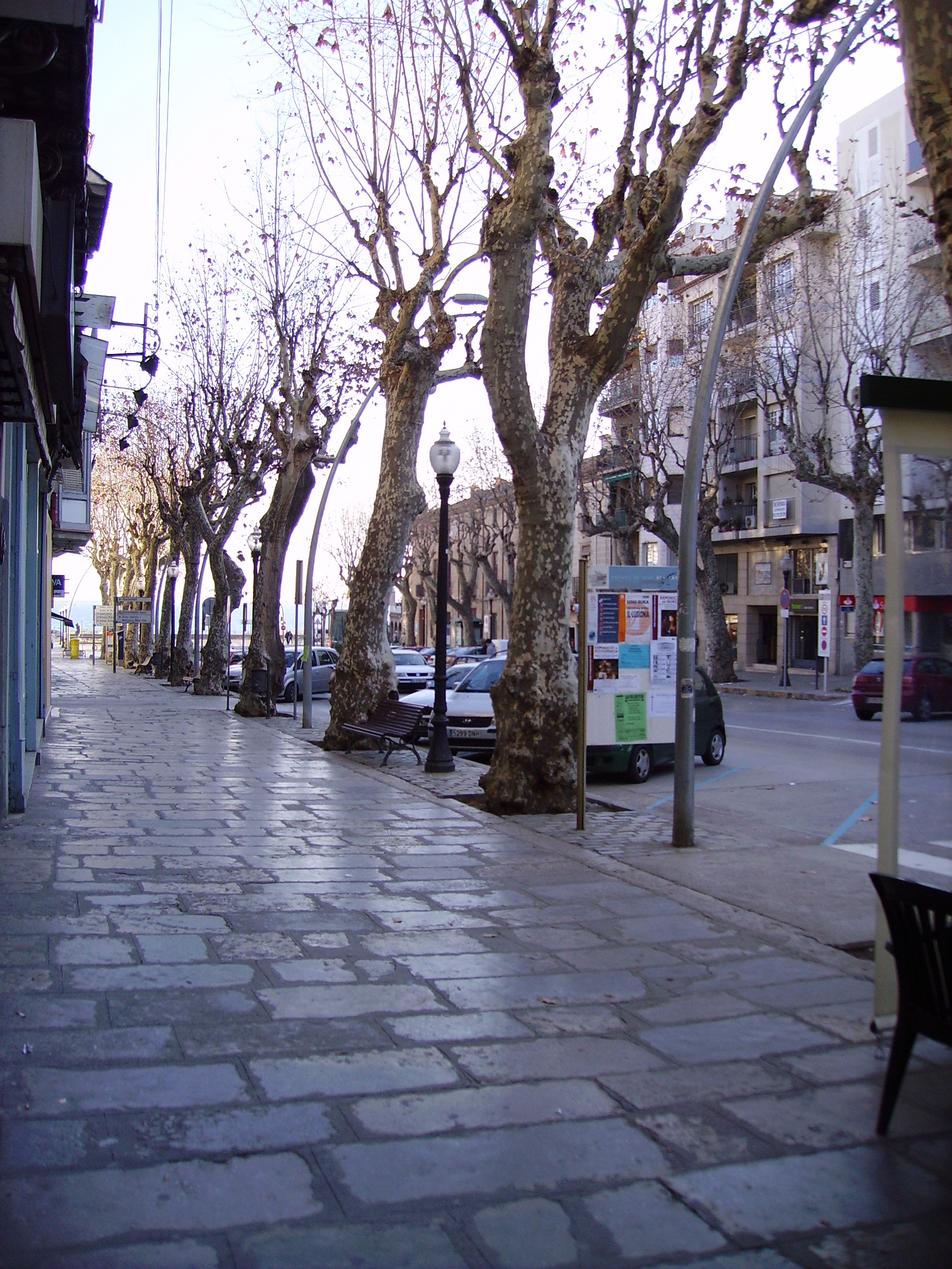 Riera d'Arenys de Mar, El Maresme, Catalunya.